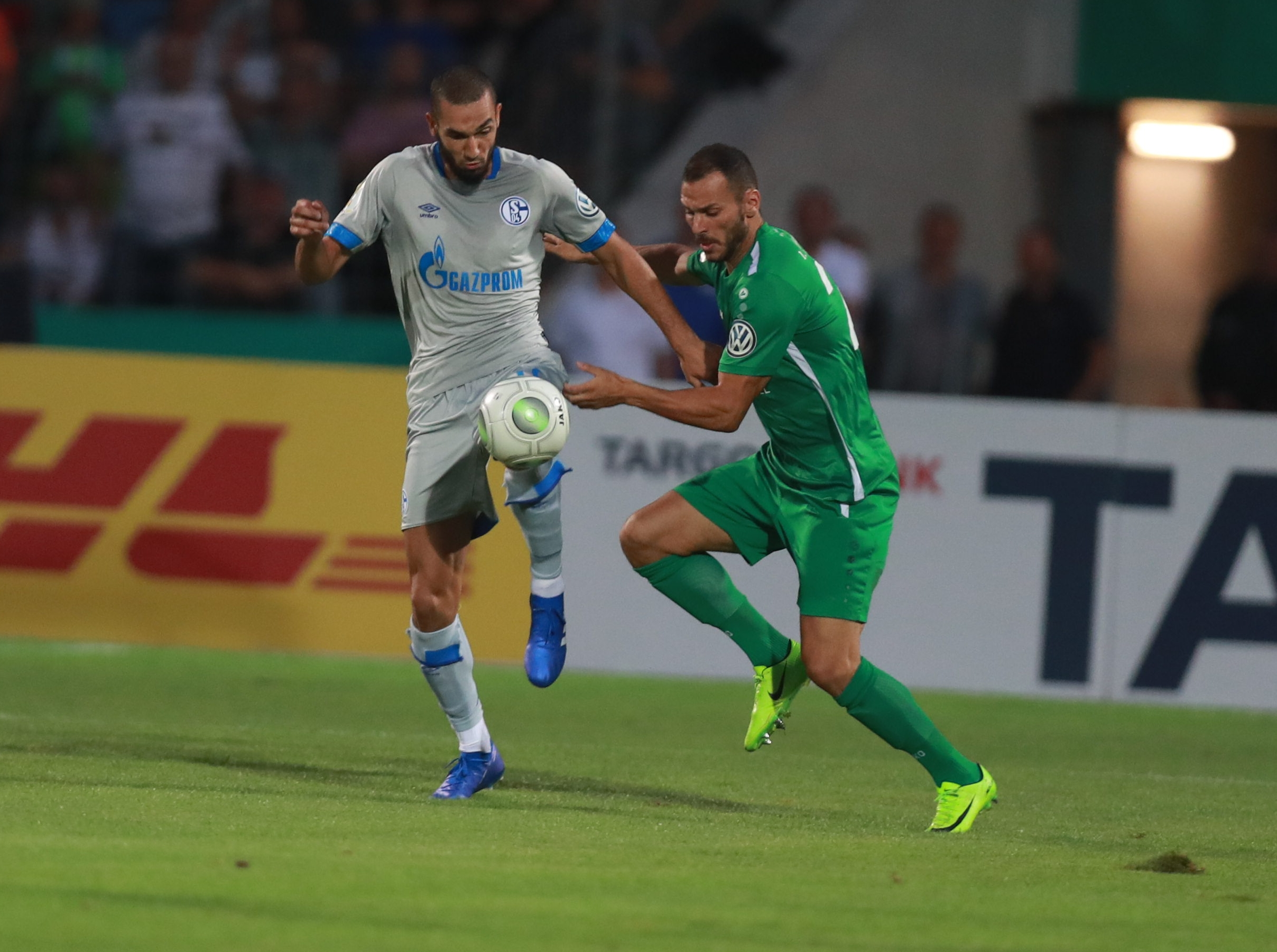 DFB-Pokal 2018/19, 1. Hauptrunde: 1. FC Schweinfurt 05 gegen FC Schalke 04 0:2 (0:1)